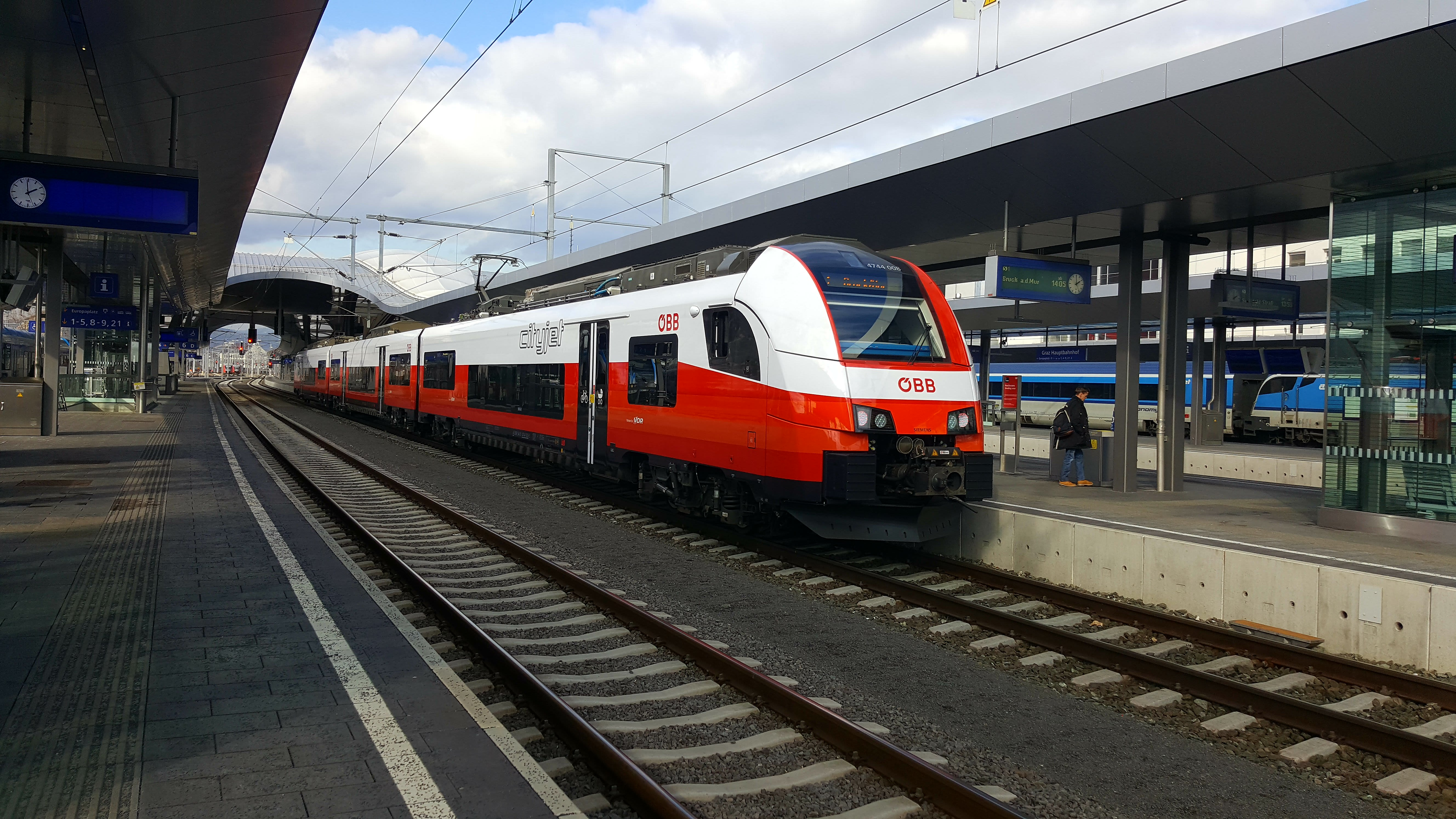 4744 008 als S1 in Graz Hauptbahnhof